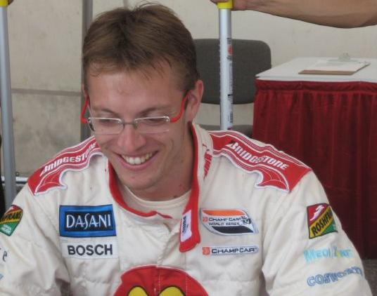 Sébastien Bourdais in 2007.